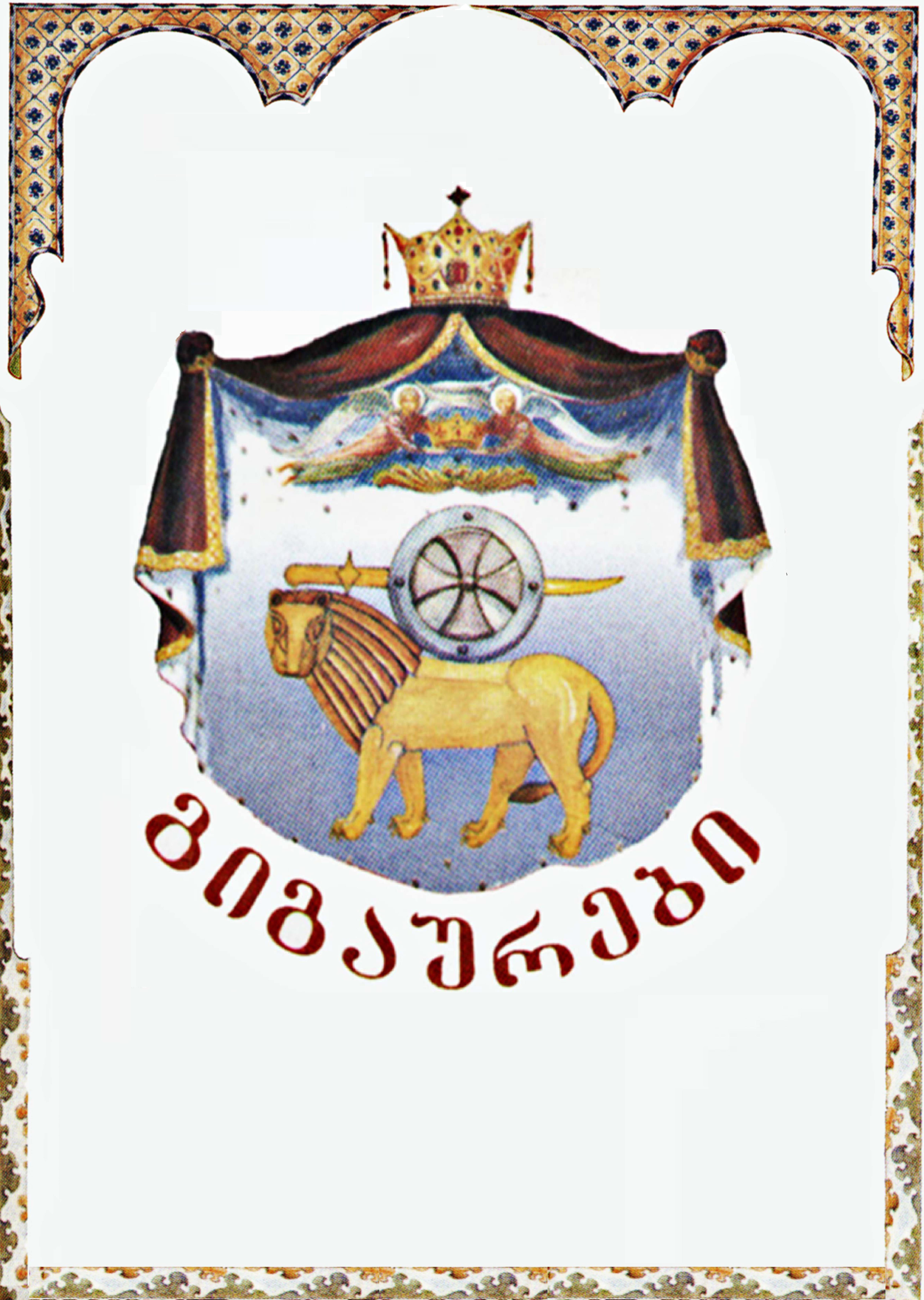 გიგაურების გერბი